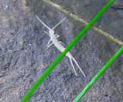 Doppelschwanz im Garten am Nachmittag